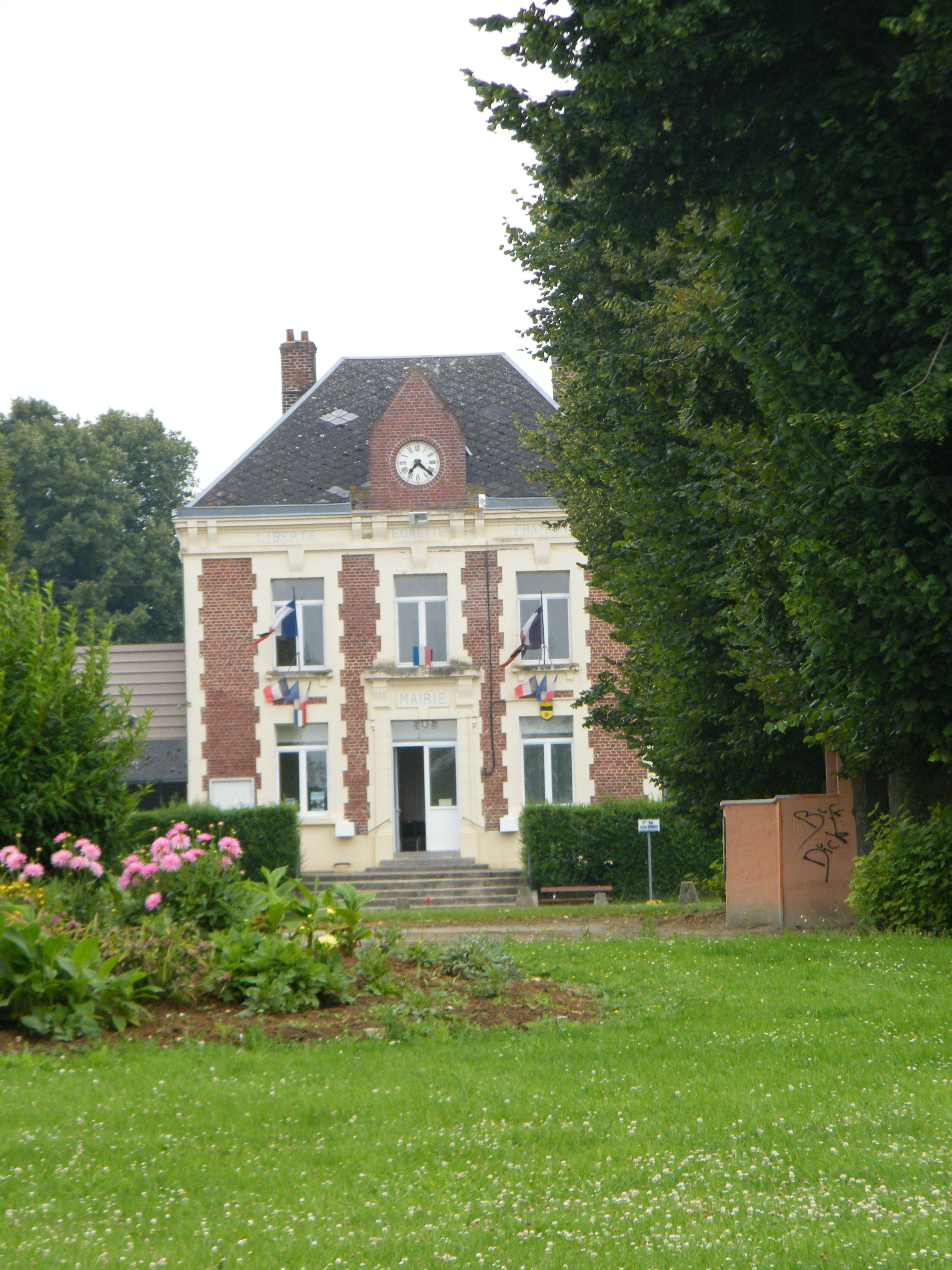 Mairie de Biaches, Somme, France.